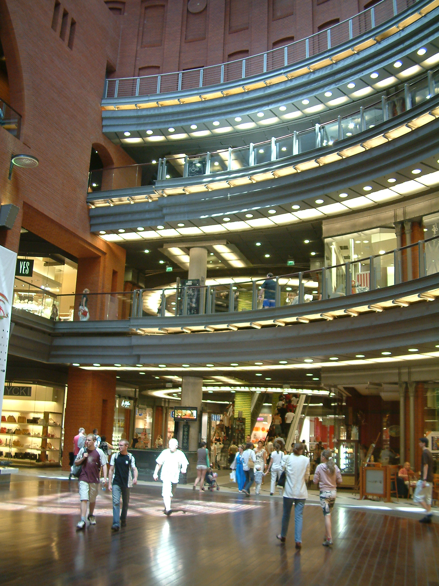 Stary Browar in Poznań, interior